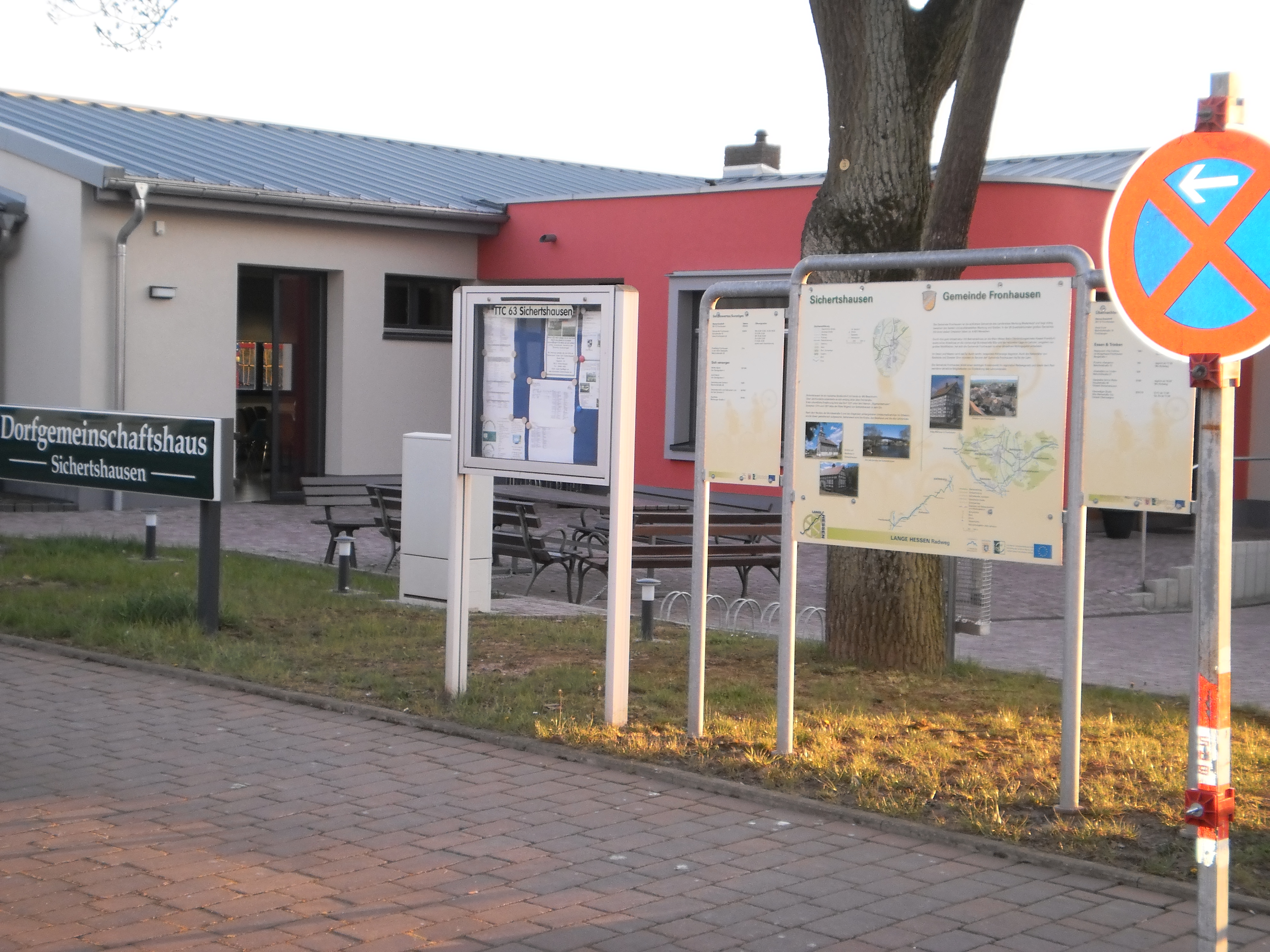 Das Dorfgemeinschaftshaus (DGH) in Sichertshausen (Fronhausen). Direkt vor dem Gebäude befinden sich Informationstafeln der örtlichen Vereine, sowie ein Übersichtsplan zum Lahntalradweg, der hier vorbeiführt. Wenige Meter rechts vom Bild (hier nicht sichtbar) zweigt die Radroute "Lange Hessen" in Richtung Hassenhausen und weiter nach Amöneburg ab (Wegweiser wird oben im Bild mit der Maus sichtbar).